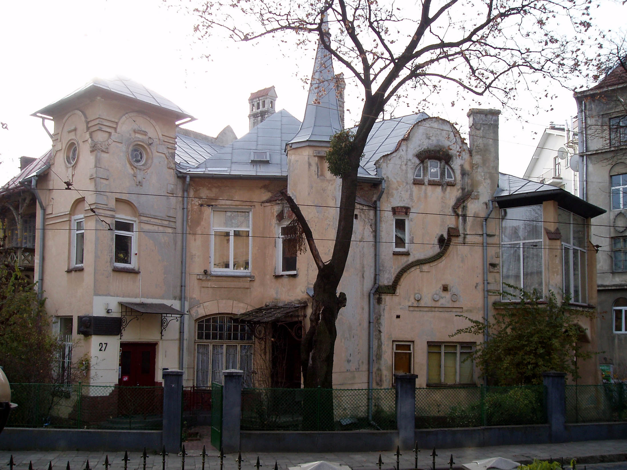 Дім № 27 на вулиці Котляревського у Львові. Архітектор Владислав Садловський (1869-1940).